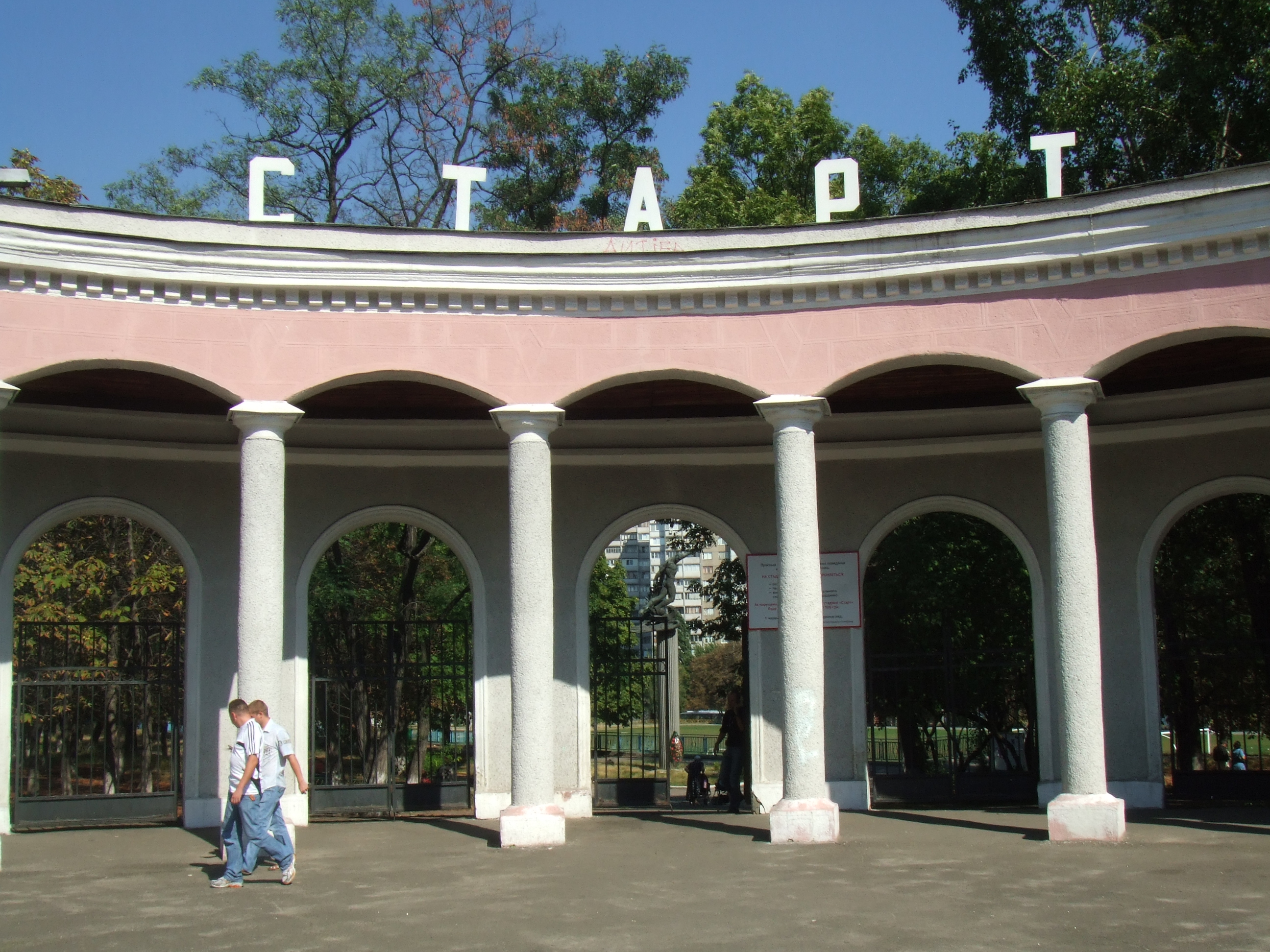 Man kann durch den Eingang des Stadions das Denkmal erkennen. Das Stadion hieß früher "Zenit" und wurde nach dem zweiten Weltkrieg in "Start" umbenannt. "FC Start" hieß auch die sowjetische Mannschaft die gegen die deutsche Auswahl gewonnen hat. Современный вид.